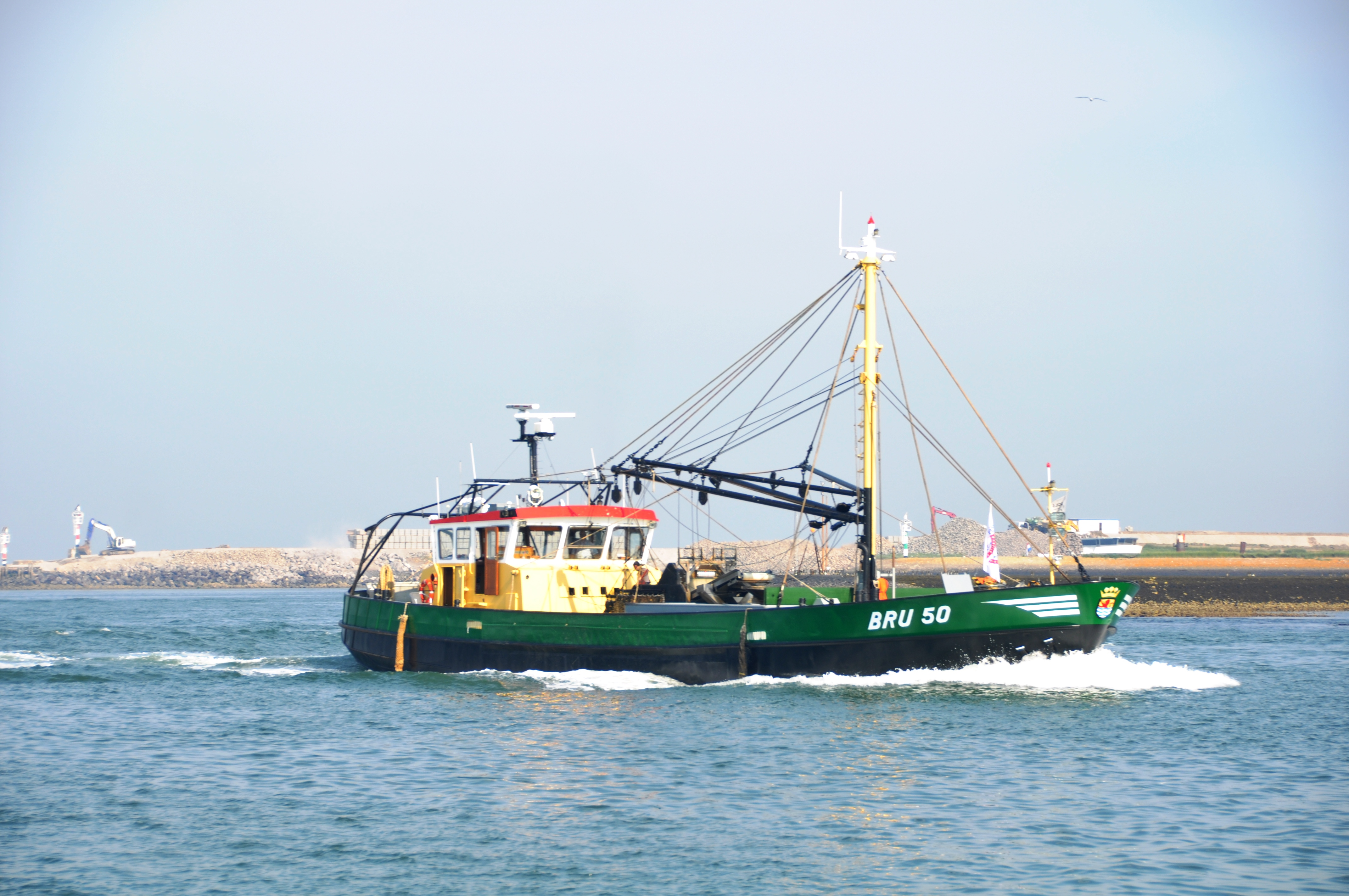 De BRU 50 WISSELVALLIGHEID aan het werk.